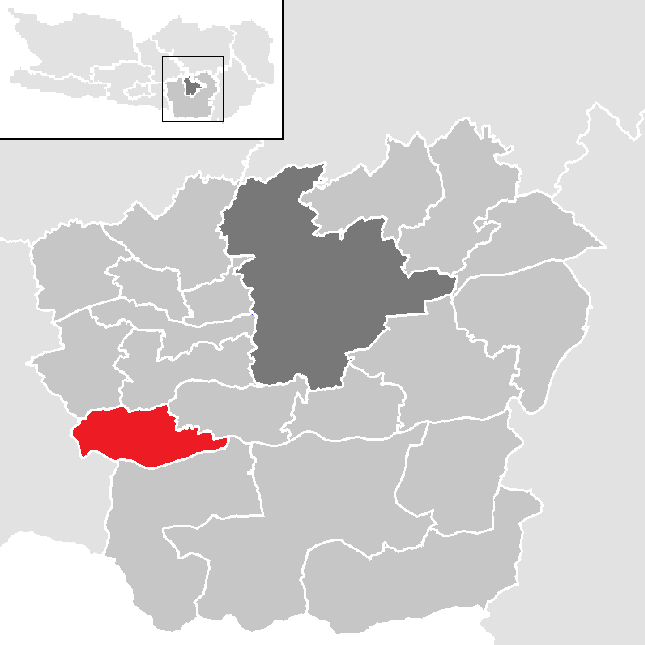 Bezirk Klagenfurt-Land